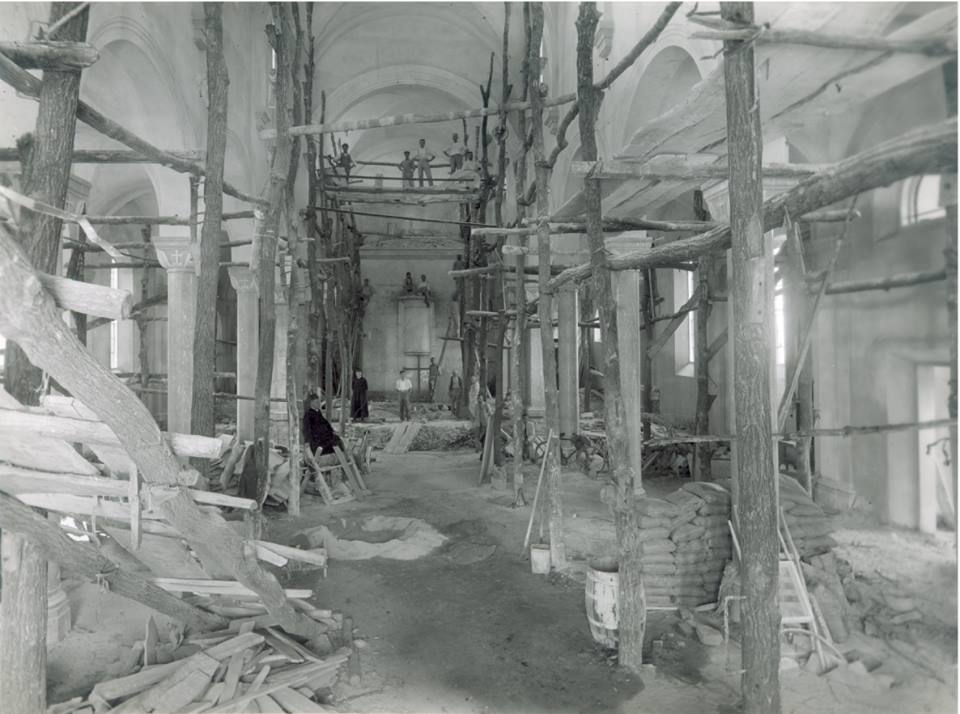 Muzzolon_Chiesa in costruzione